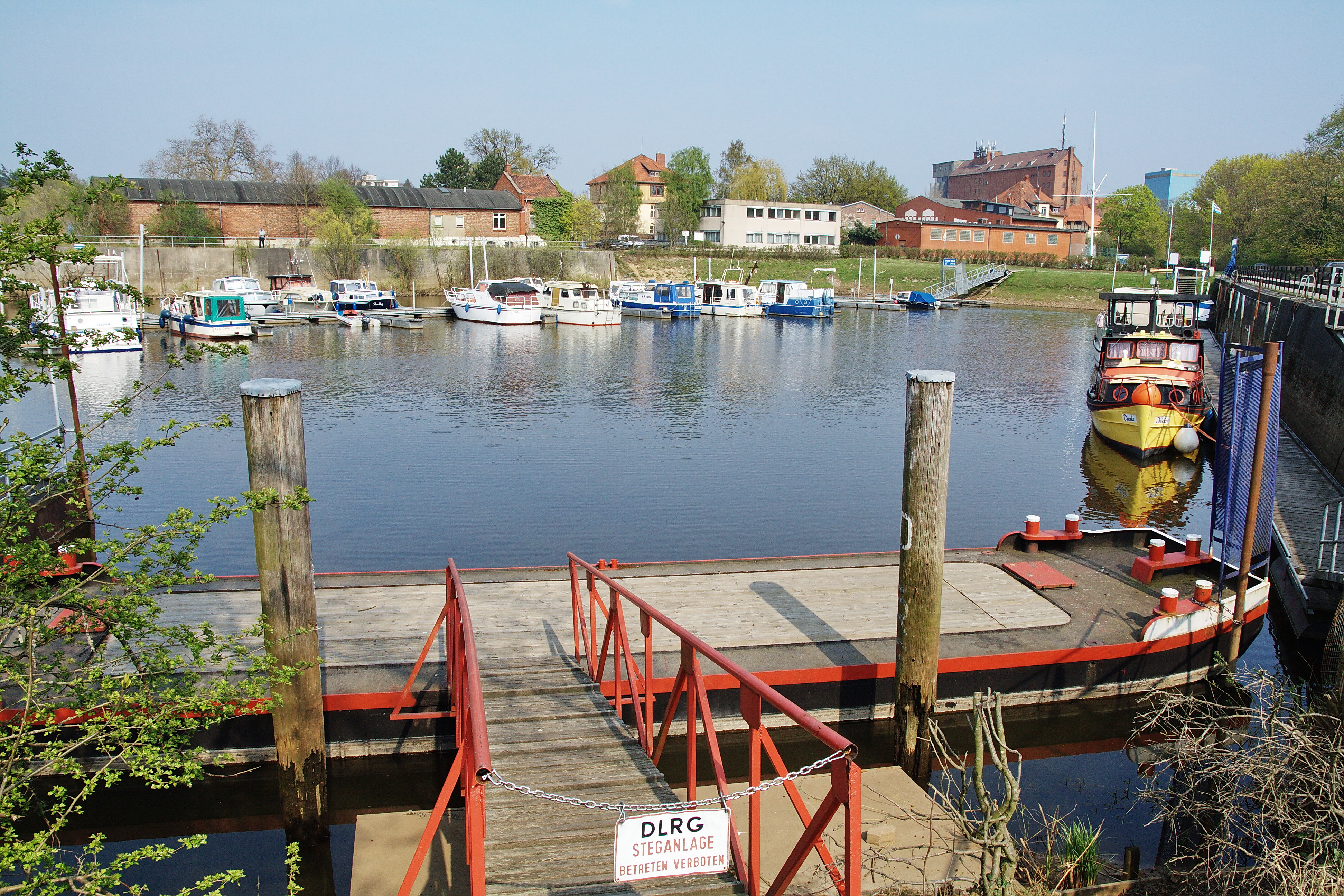 Celler Hafen in Celle, Niedersachsen, Deutschland